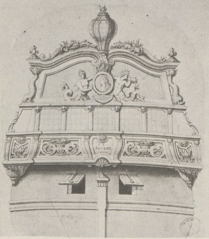 Poupe du vaisseau de cinquième rang du niveau de la frégate : le Favory de 36 canons lancé en 1692 à Bayonne.